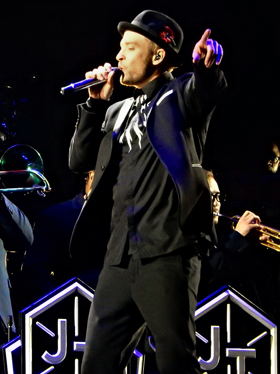 El cantante Justin Timberlake durante su presentación en el V Festival como parte de su gira The 20/20 Experience World Tour. Hylands Park, Chelmsford, Reino Unido.